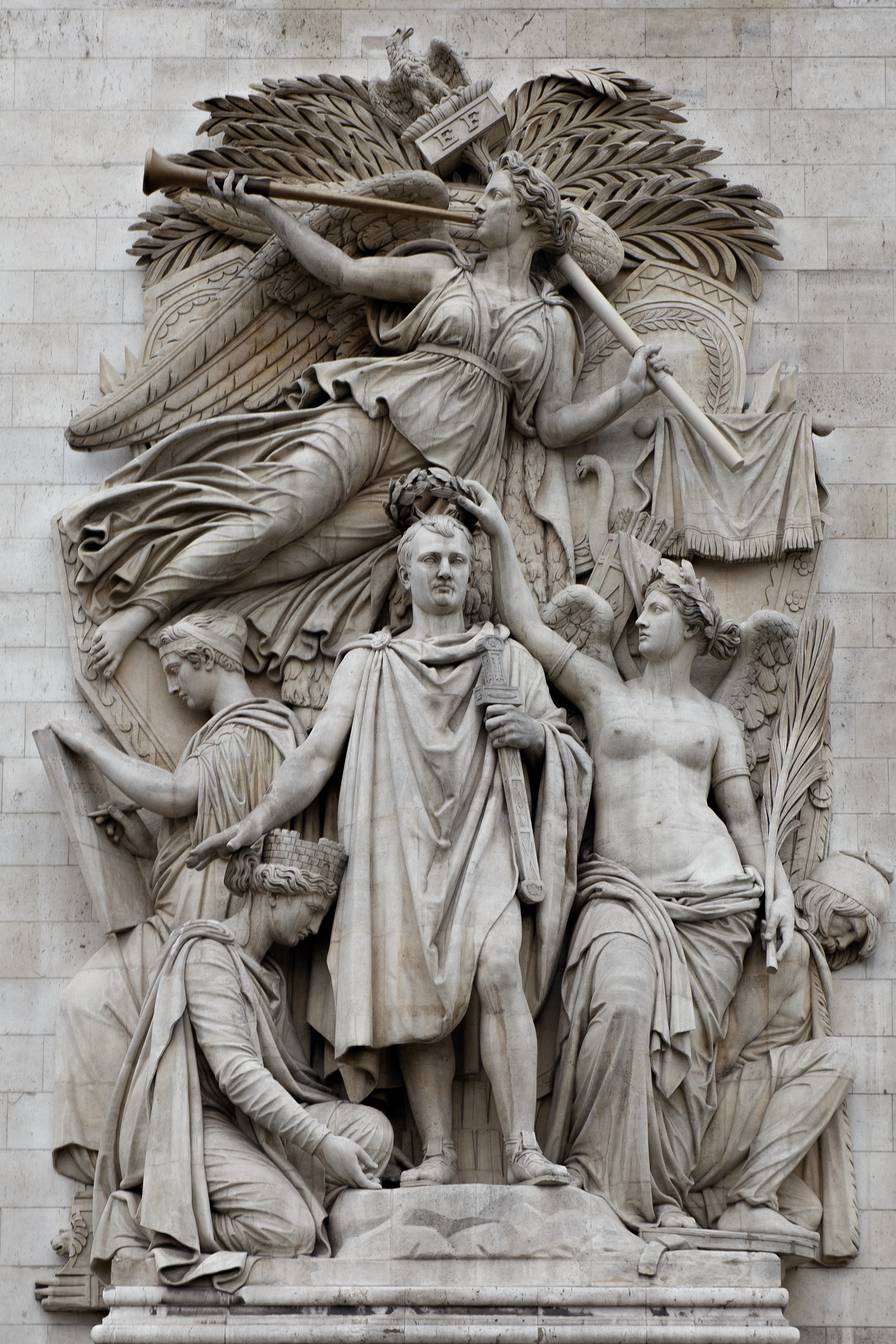 Le Triomphe de 1810, groupe sculpté de Jean-Pierre Cortot, sur l'arc de triomphe de l'Étoile à Paris